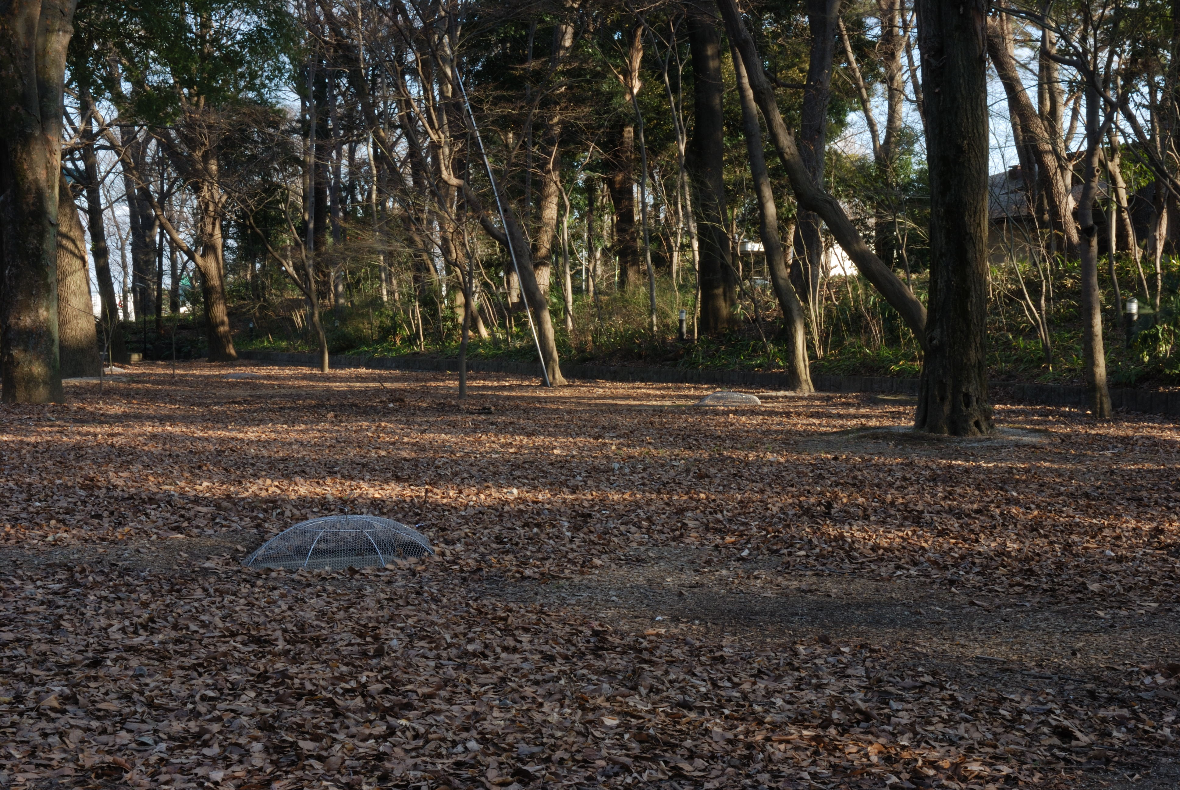 Okusawa castle